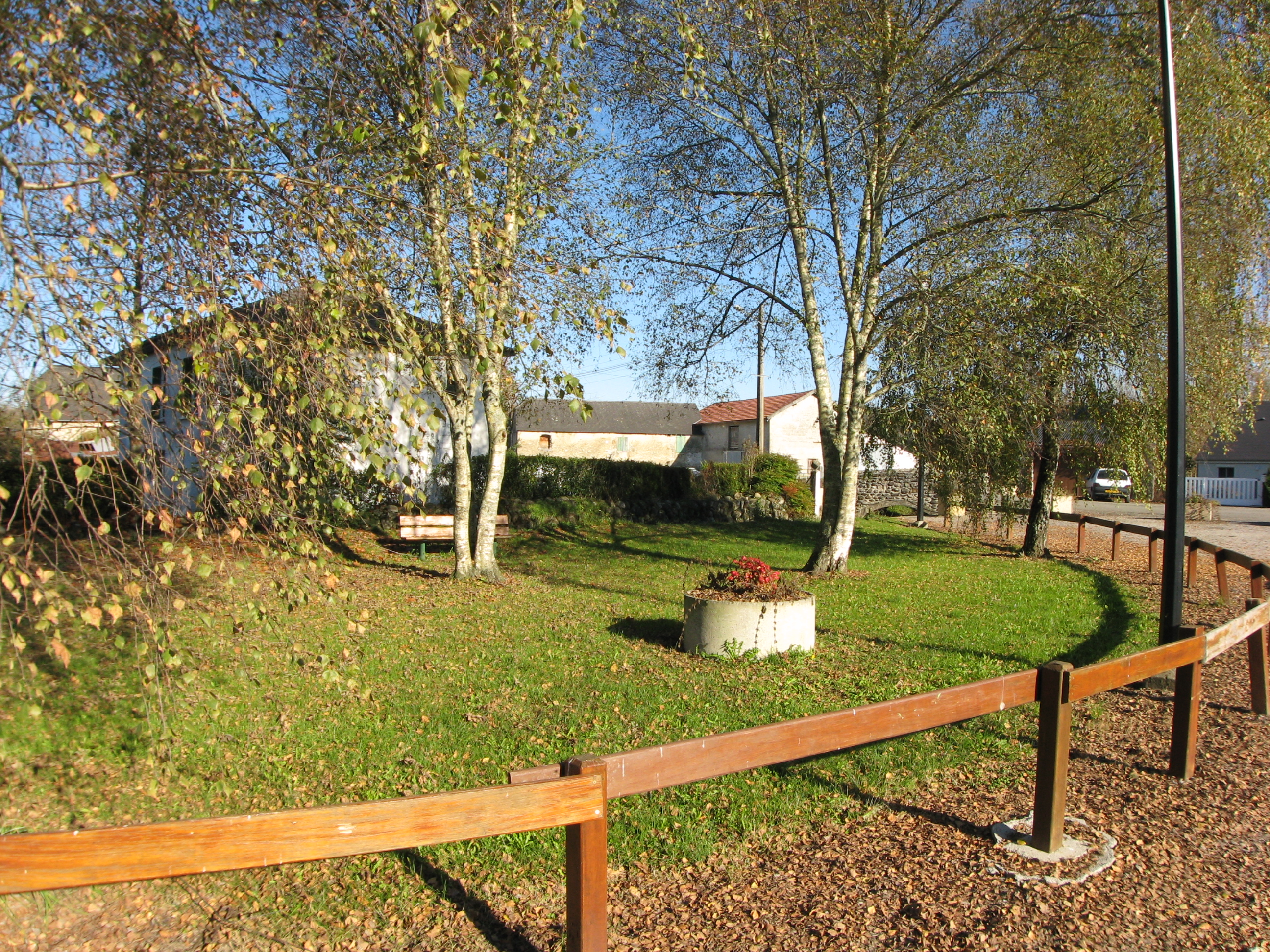 Parc en bordure d'un canal près du fronton d'Ogeu-les-Bains (Pyrénées-Atlantiques) (Pyrénées).